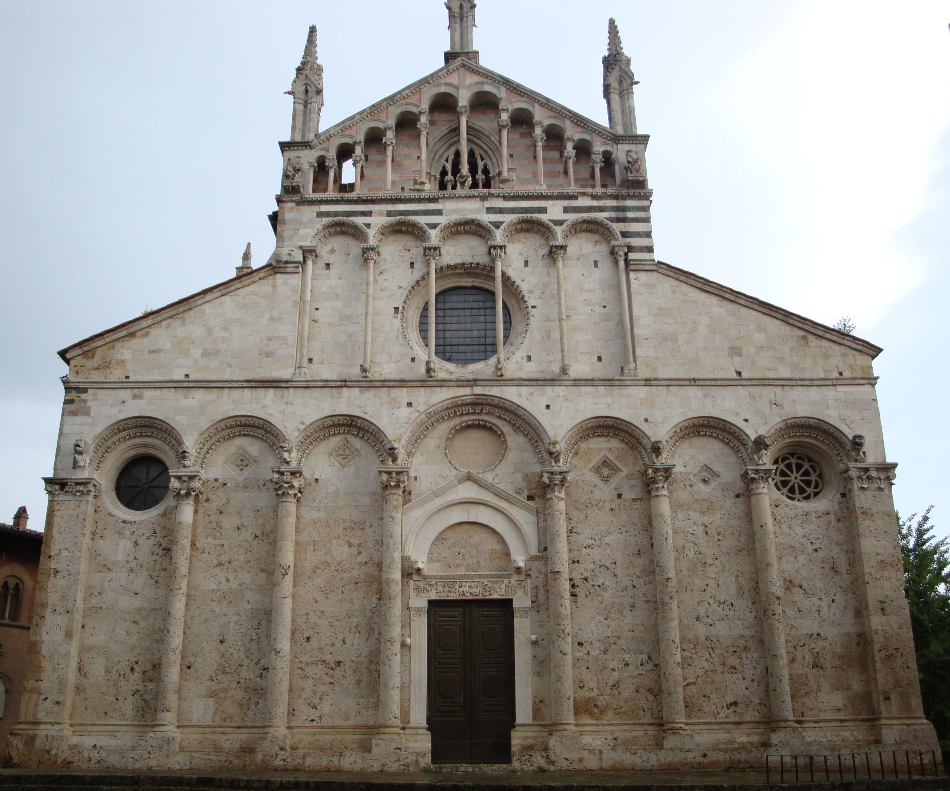 Vista de la fachada de la catedral de San Cerbone / Duomo de Massa Marittima